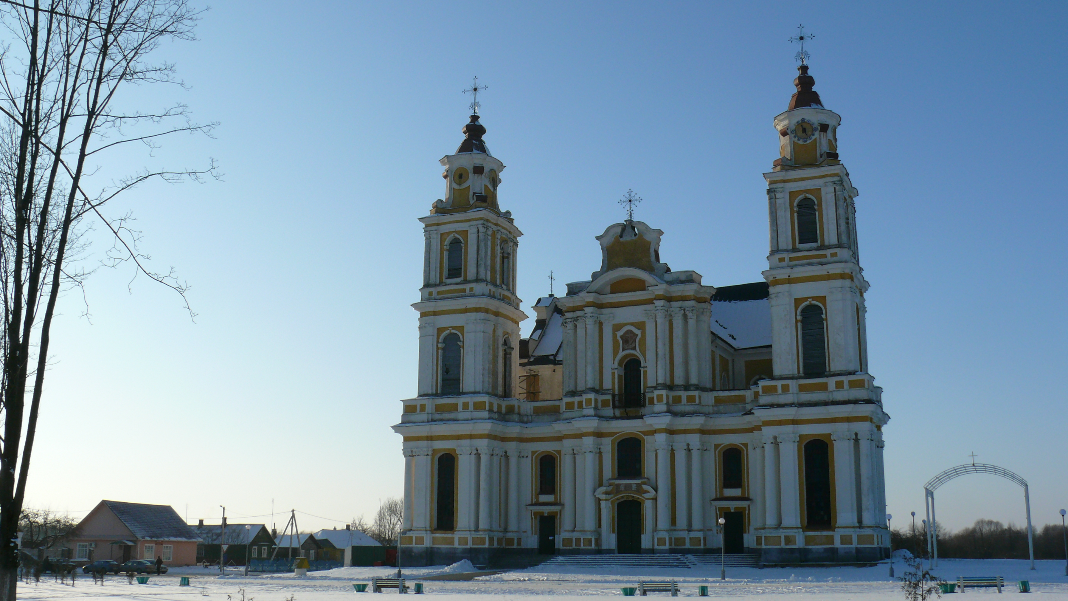 Беларуская (тарашкевіца): Комплекс былога кляштара бэрнардынцаў, дэкаратыўнае аздабленьне касьцёла: галоўны і бакавыя алтары росьпісы. в. Будслаў This is a photo of Belarusian heritage monument. Reference number: 611Г000422 ( WLM)